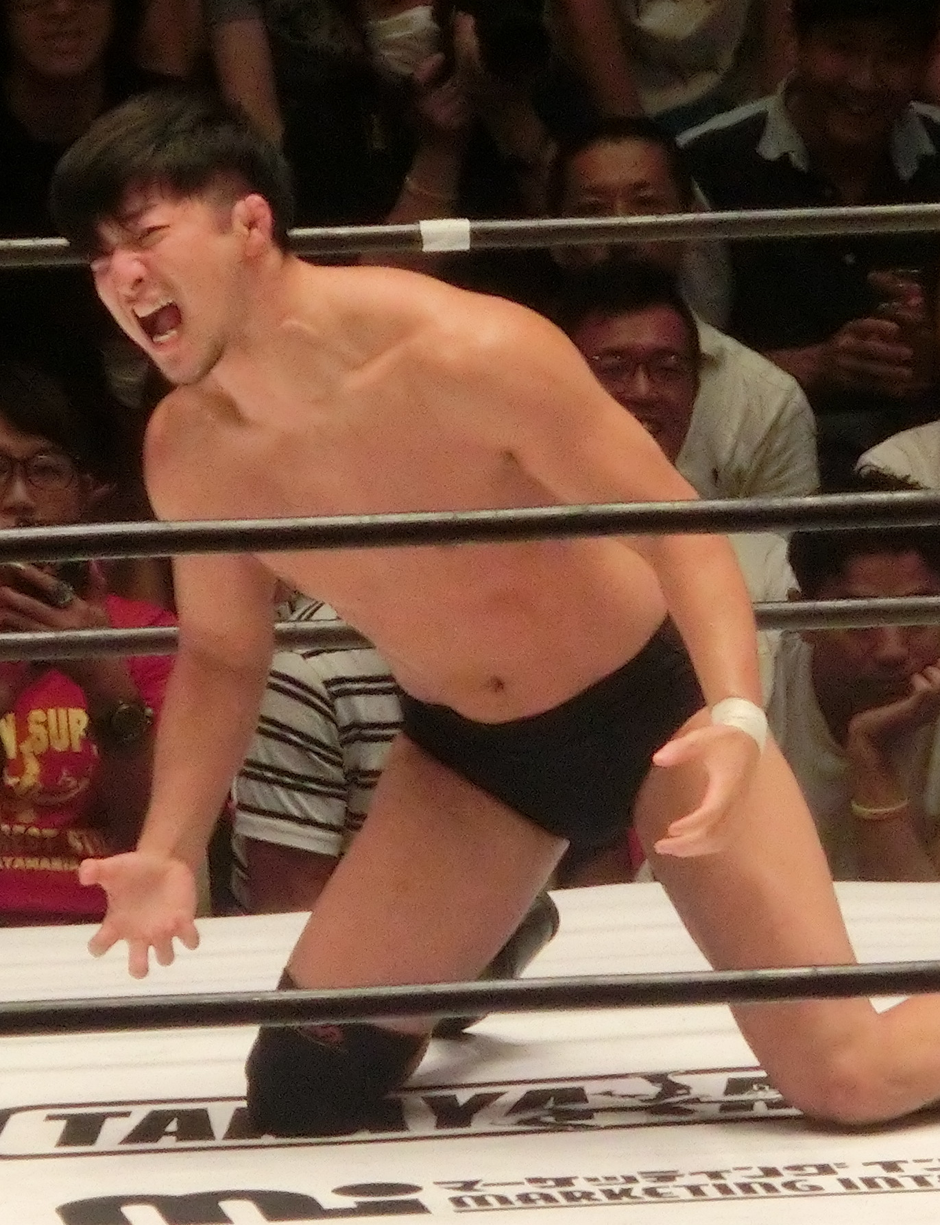 2018年8月31日、後楽園ホール